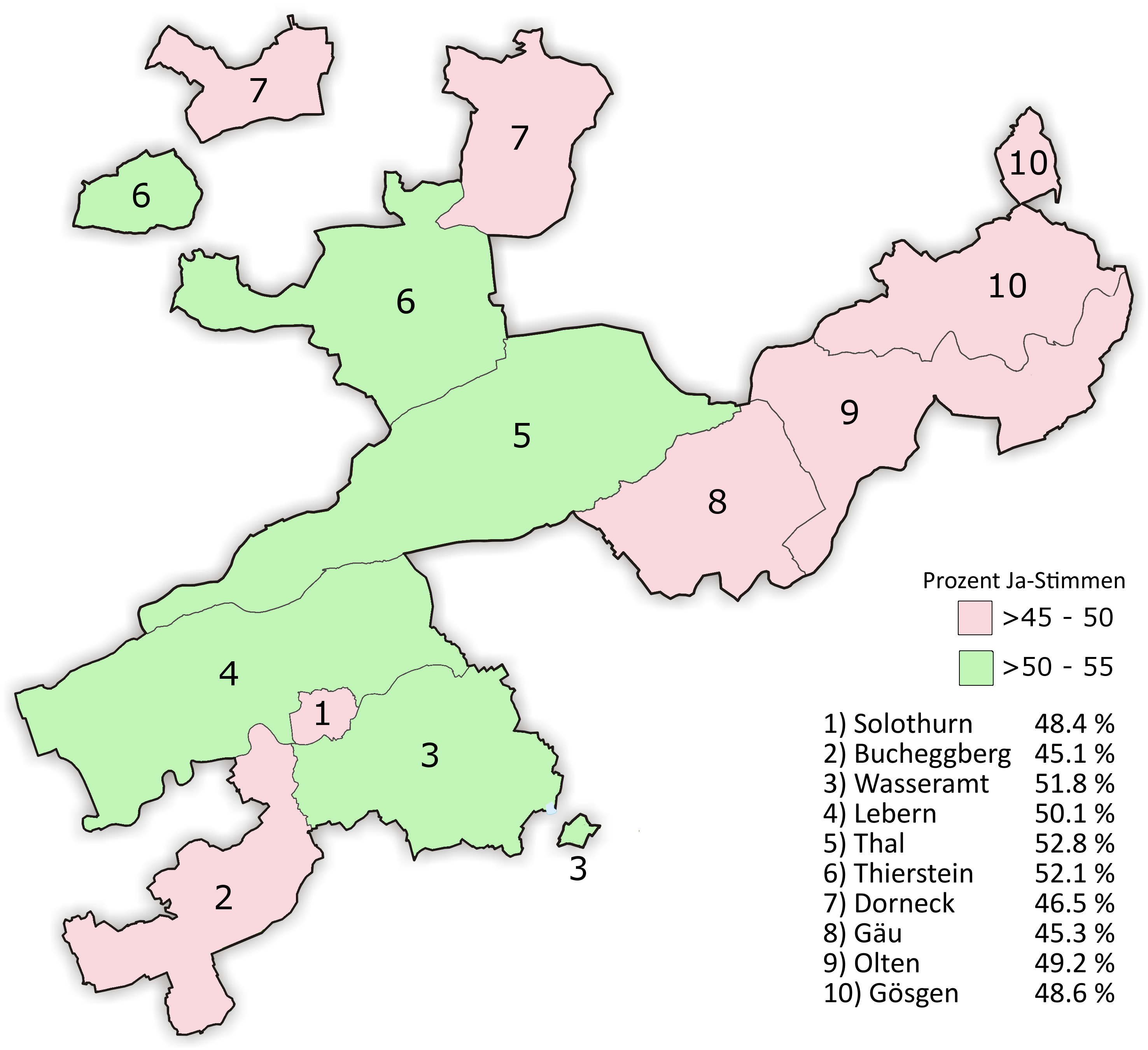 Abstimmungsergebnis der kantonalen Volksabstimmung im Kanton Solothurn vom 13. Juni 1999 über die Vorlage "Für eine faire Verbilligung der Krankenkassenprämien". Ergebnisse nach Bezirken